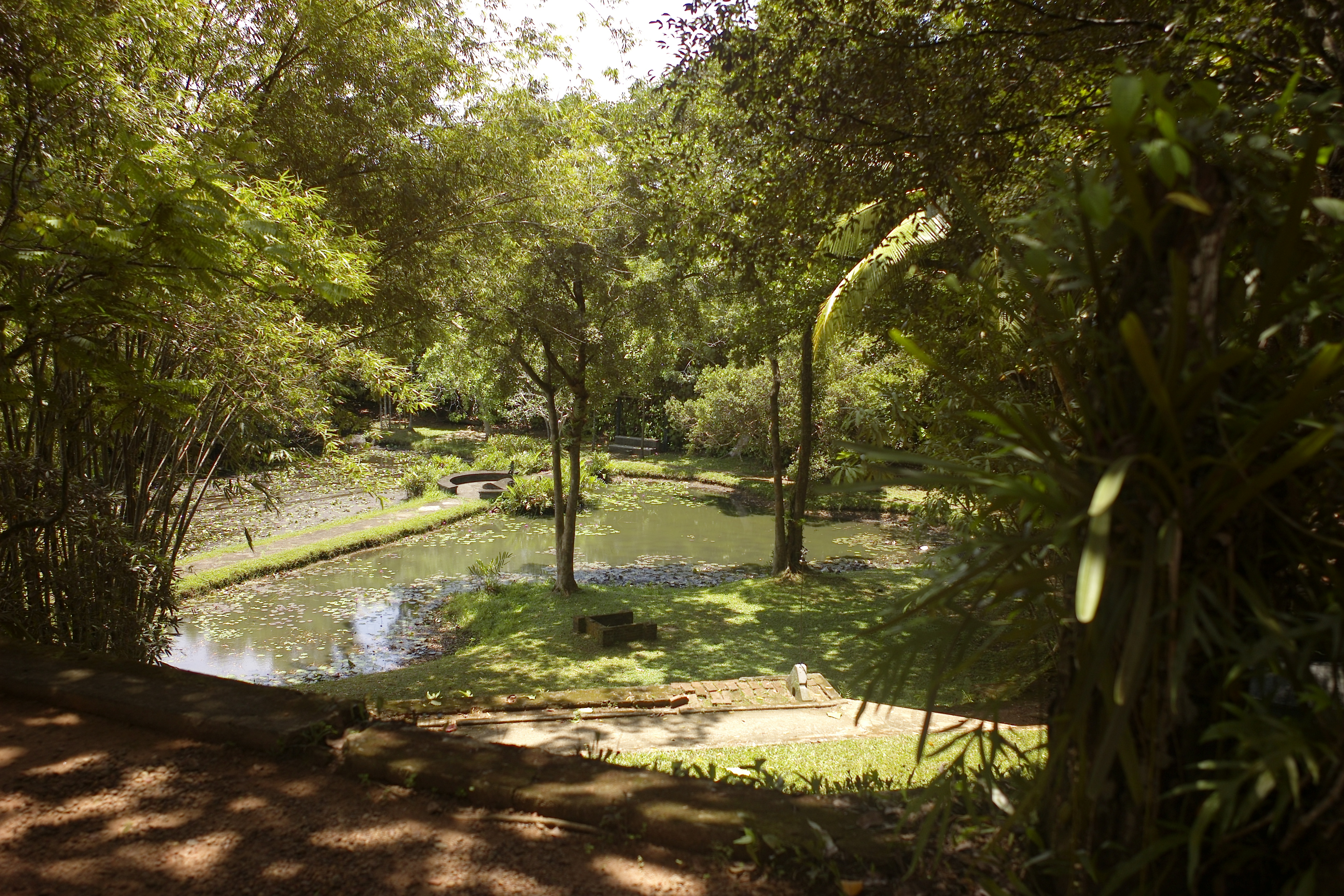 From the Sri Lankan architect Geoffrey Bawa's house and garden Lunuganga in Bentota, Sri Lanka